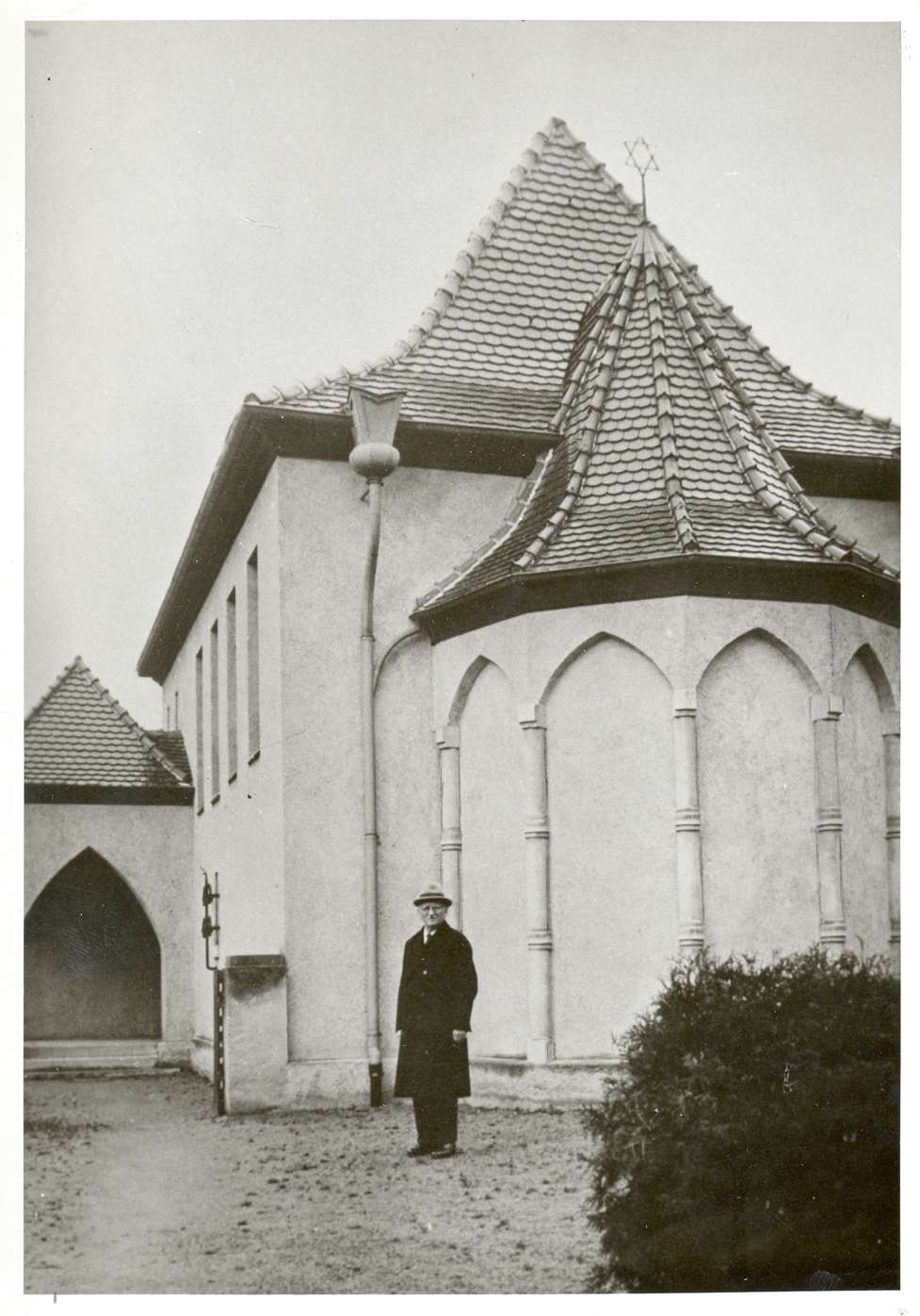 Synagoge (Gernsbach) Nutzungsbedingungen ausdrücklich auch für Wikipedia (siehe: [1]